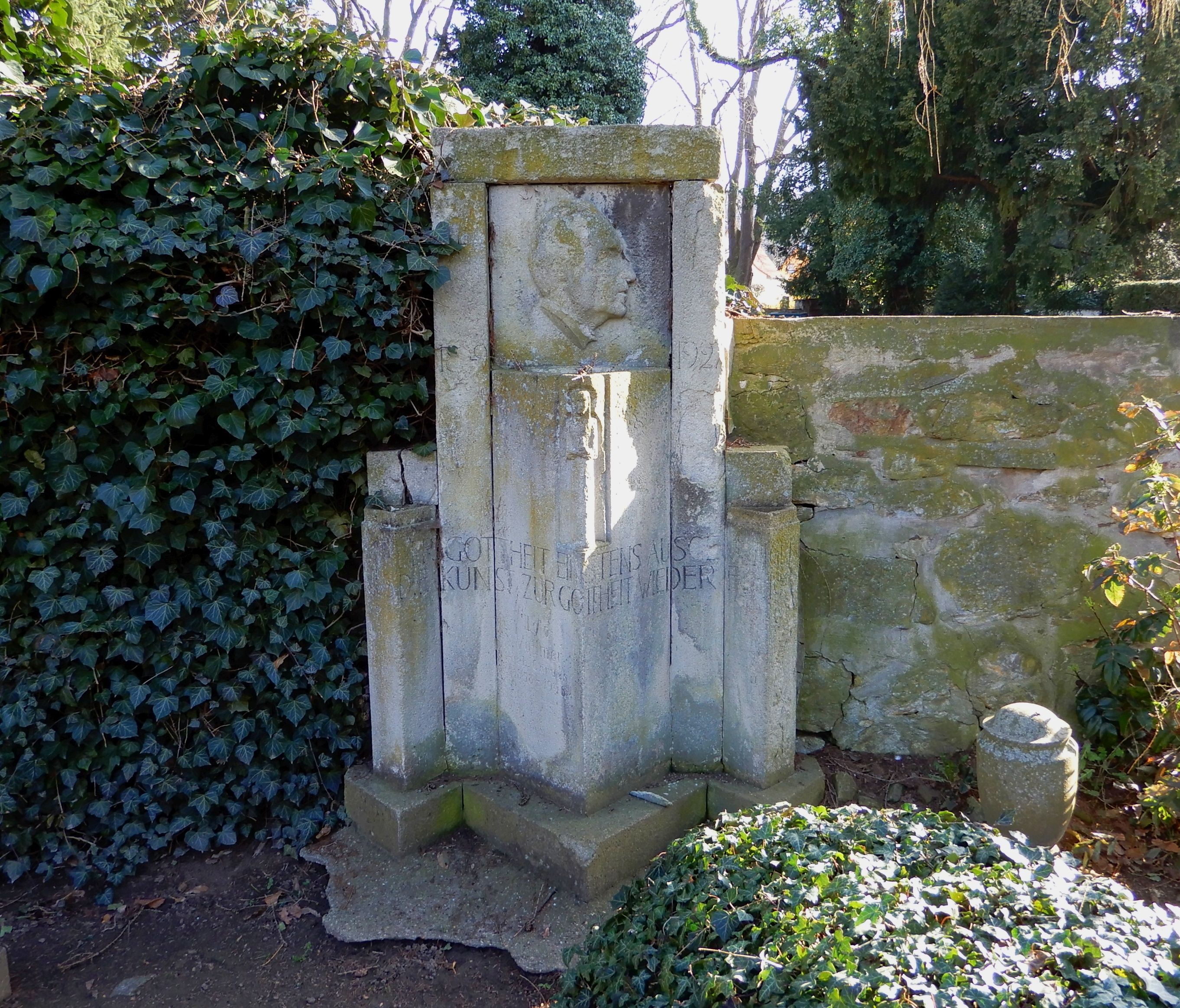 Grabdenkmal für Arthur Vollmer (1849-1927) auf dem Friedhof Ballenstedt